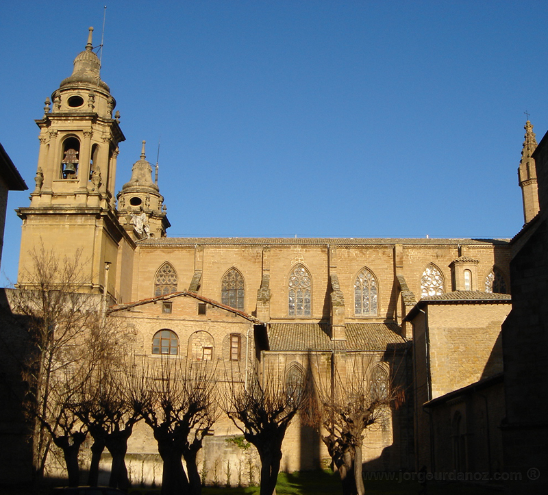 fachada